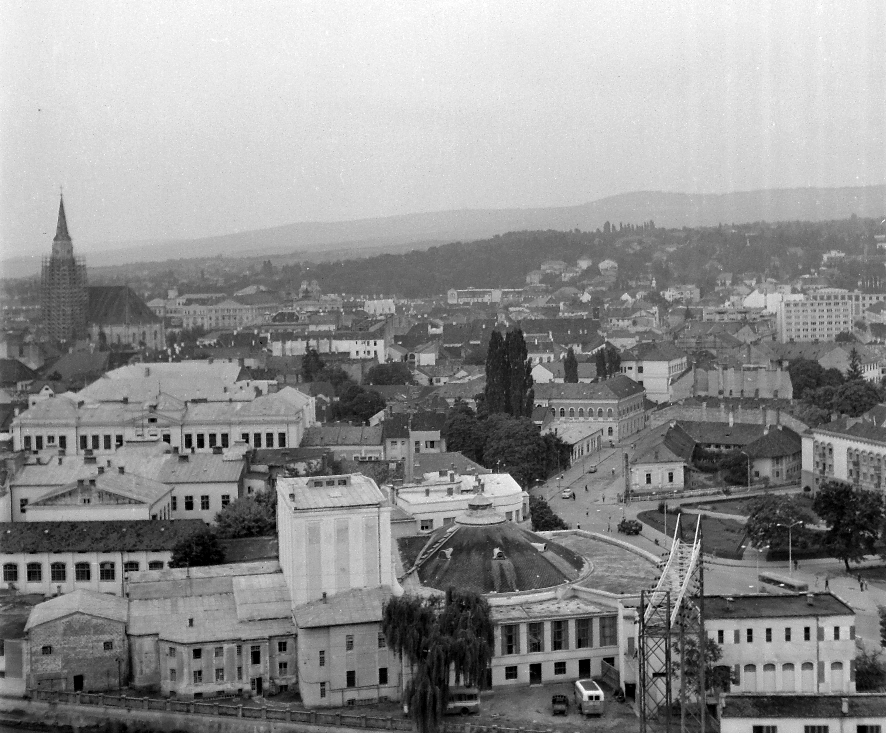 Kolozsvári Állami Magyar Színház és Opera, a háttérben a Szent Mihály-templom és a Feleki-tető. Location: Romania, Transylvania, Cluj-Napoca Title: Kolozsvári Állami Magyar Színház és Opera, a háttérben a Szent Mihály-templom és a Feleki-tető.